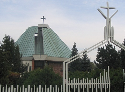 Kościół ewangelicko-augsburski w Hołdunowie